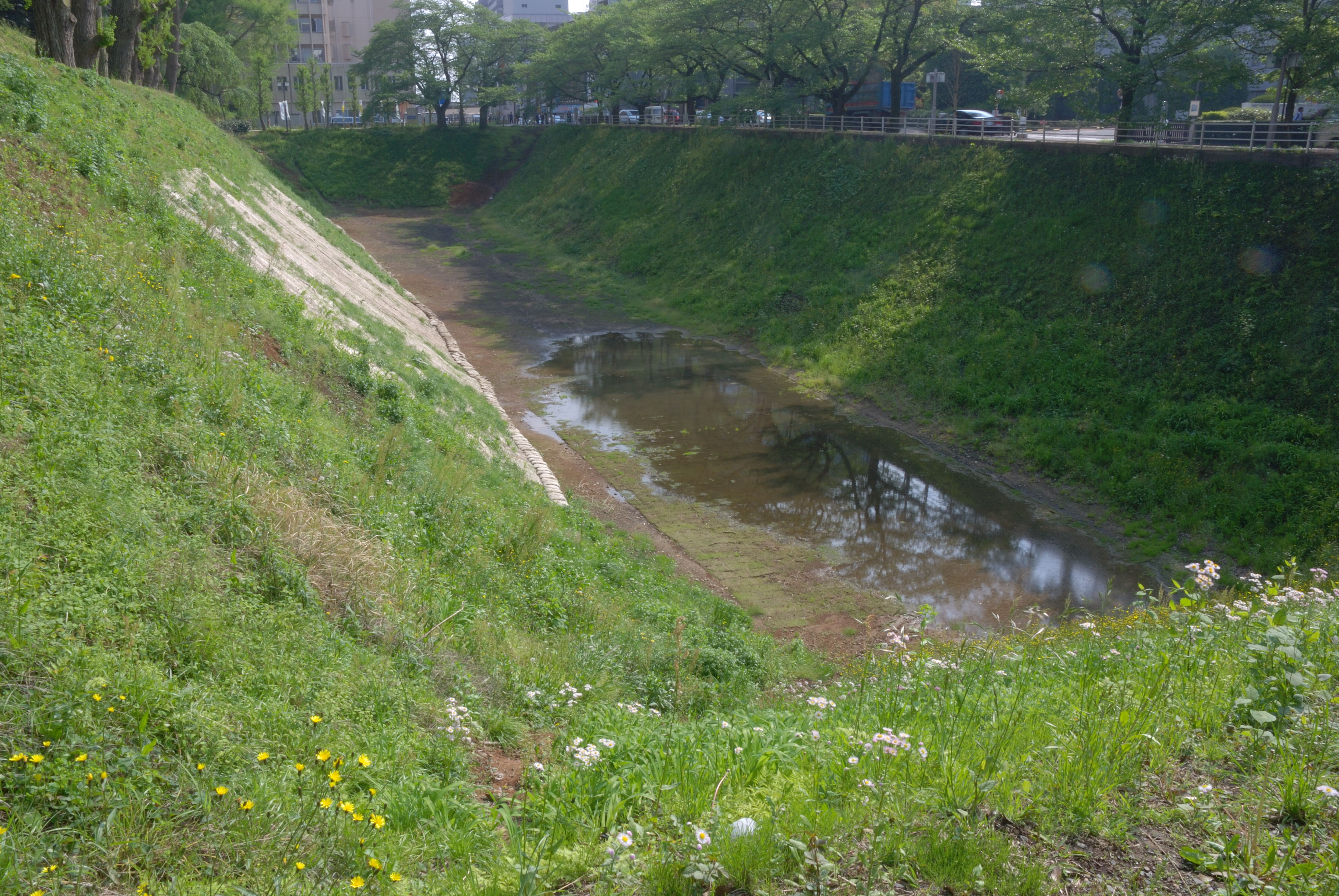 Sannomaru karabori